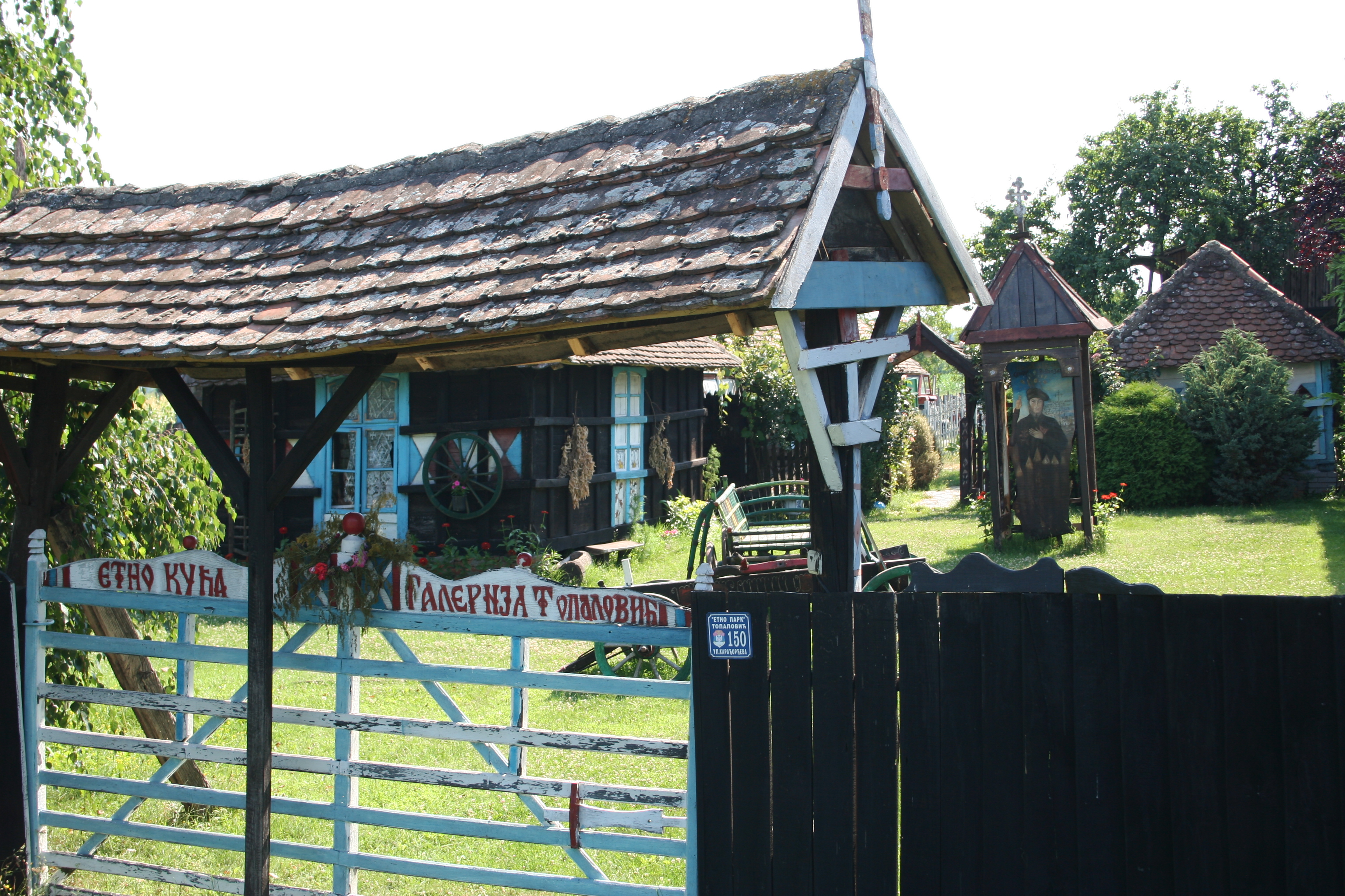 Etno selo u Lipolistu